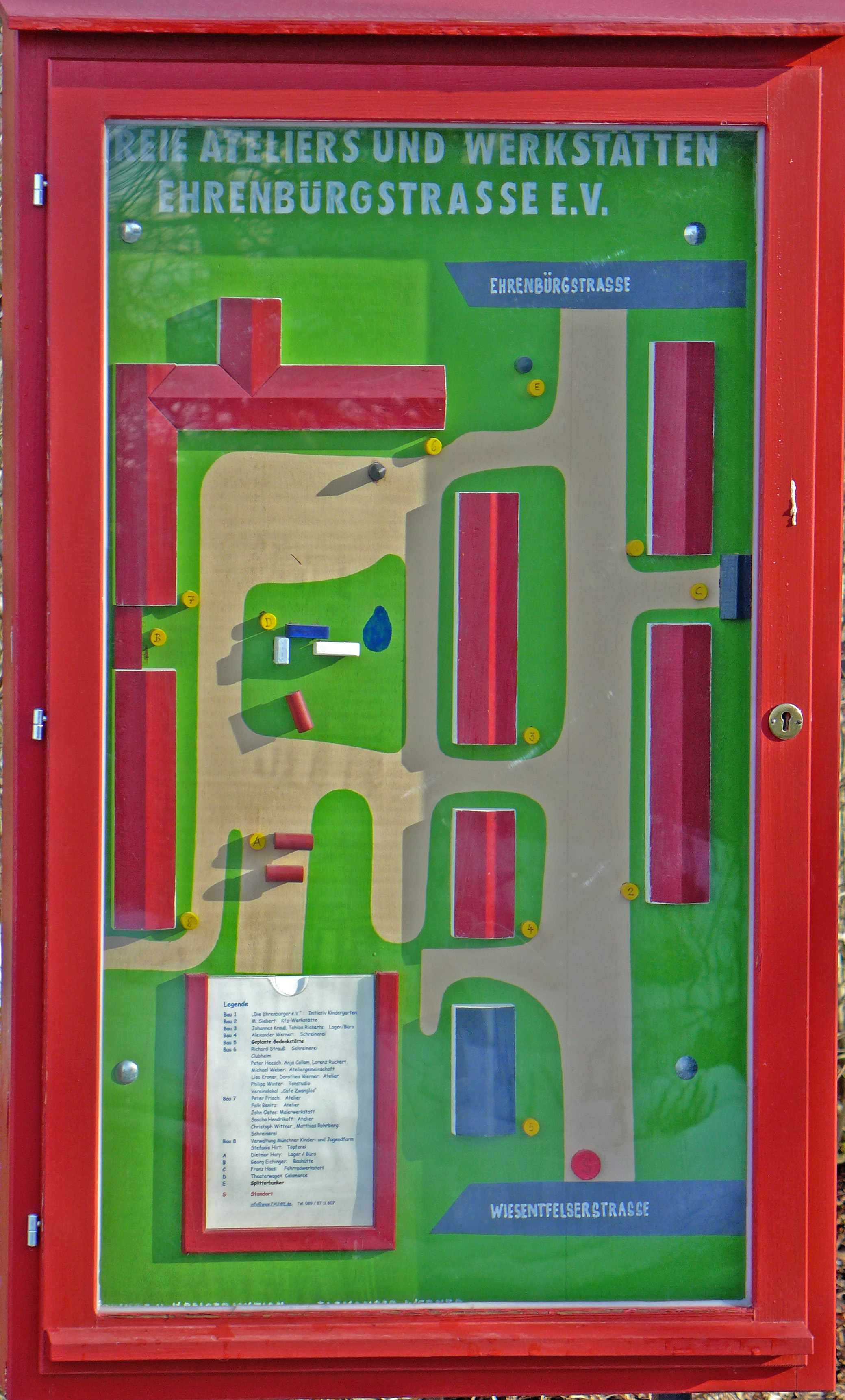 Ehemaliges Zwangsarbeiterlager in München-Aubing: Schaukasten am Eingang der Anlage